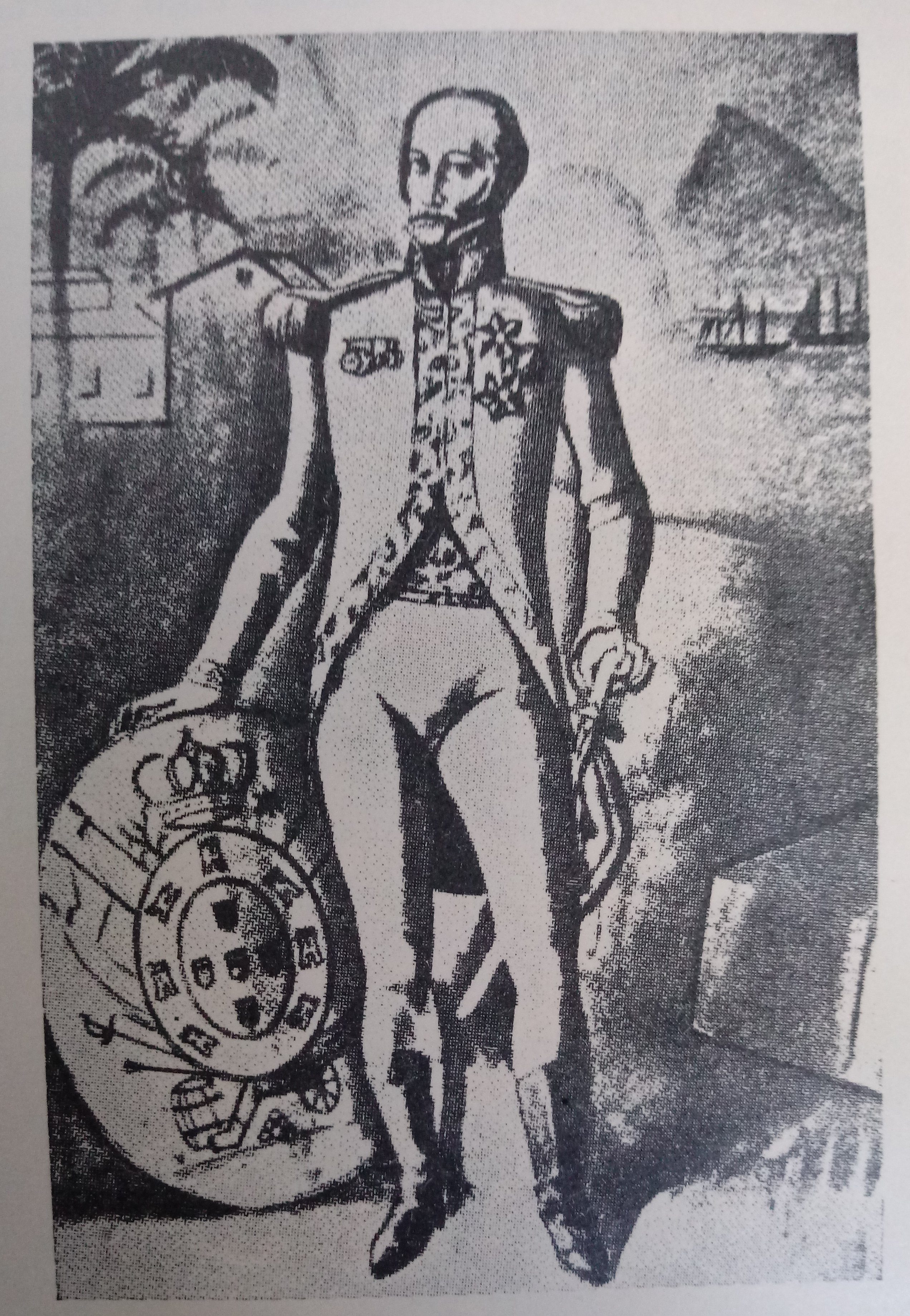 Imagem do general luso-brasileiro Carlos Frederico Lecor na década de 1810. No desenho o militar segura um escudo com o brasão de armas do Reino Português.